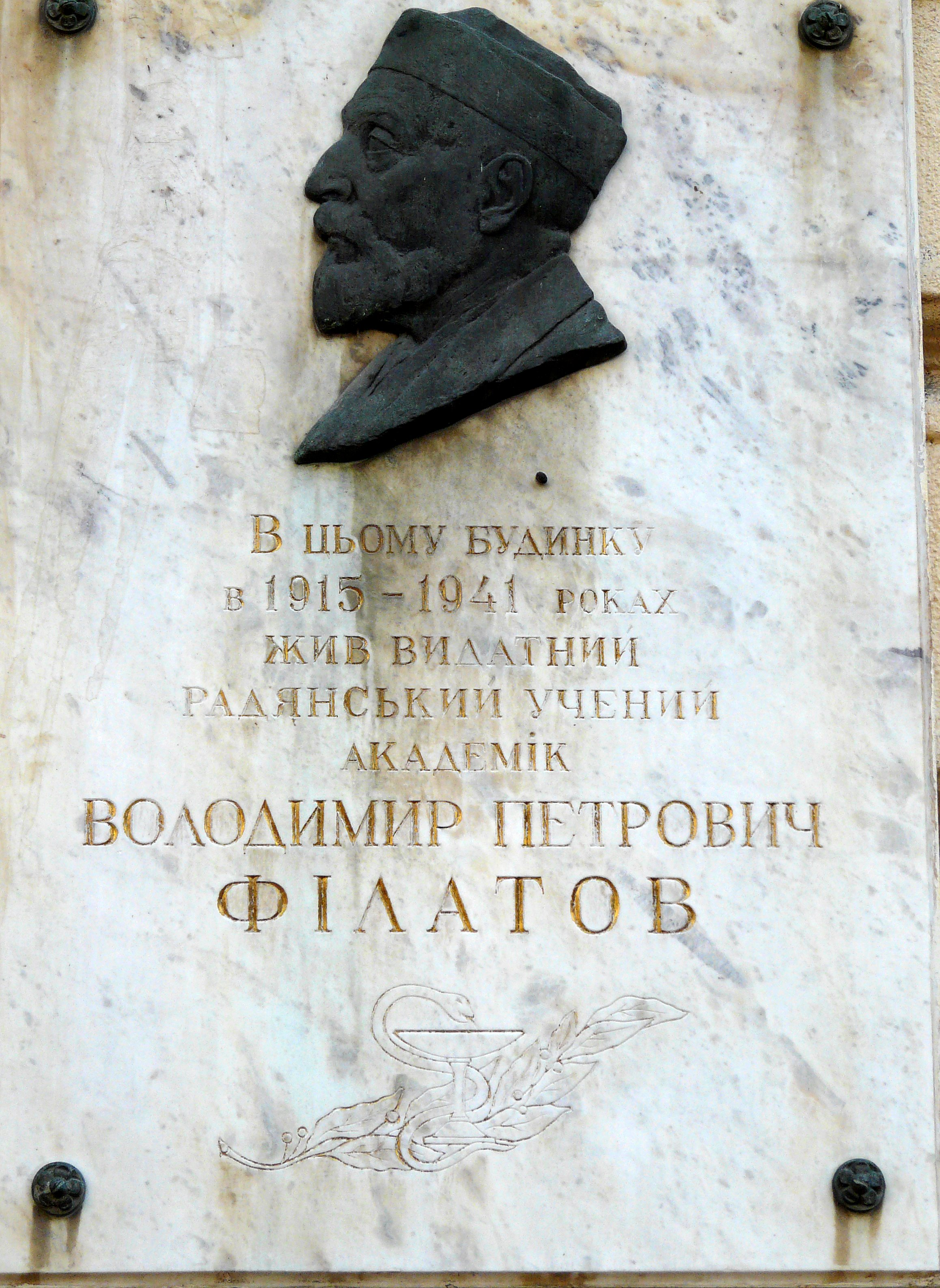 Будинок житловий Шемякіна, в якому жили:В.П. Філатов - вчений-офтальмолог, академік;С.С. Головін - професор-офтальмолог; Є.А. Шевальов - вчений-психіатр;І.І. Іванов - історик і літературний критик, професор;- А.М. Агаронов - професор, Одеса, Гоголя вул., 9